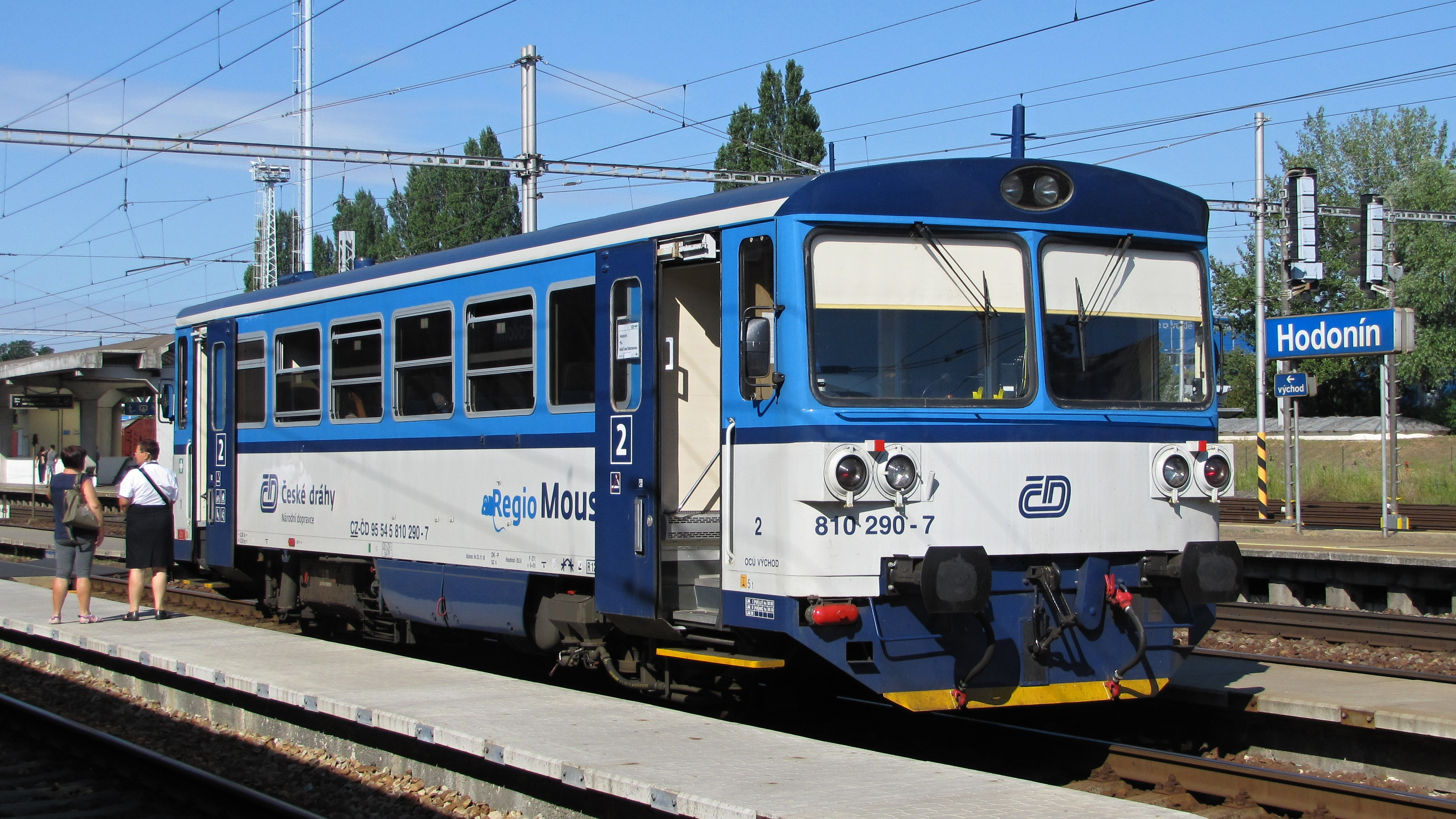 Motorový vůz 810 v železniční stanici Hodonín